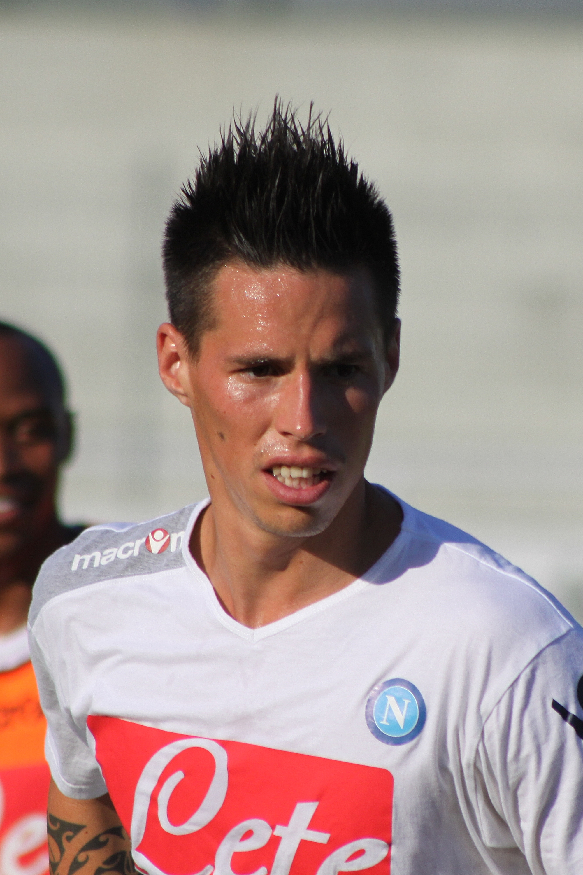 Marek Hamšík - SSC Neapel (1) Marek Hamšík - Società Sportiva Calcio Napoli